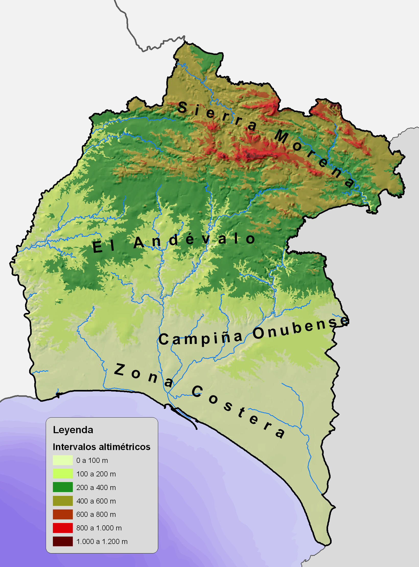 Relieve de Huelva